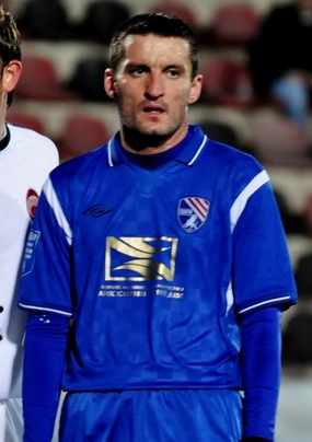 Слободан Маркович — сербский футболист.